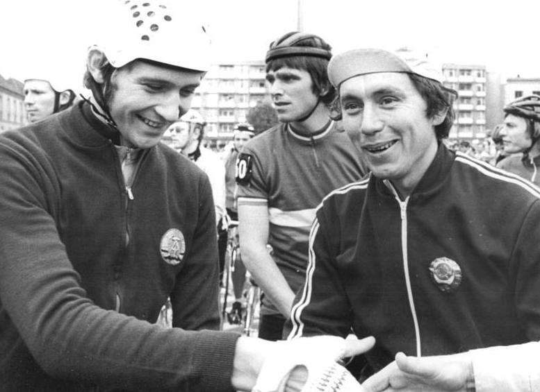 Friedensfahrt, Hartnick, Gusjatnikow ADN-ZB Reiche 9.5.77-str Warschau: 30.Internationale Friedensfahrt - 2.Etappe von Warschau nach Lodz über 133 km. Vor dem Ehrenstart in Warschau in bester Stimmung: die beiden Mannschaftskapitäne Hans-Joachim Hartnick (DDR l.) und Alexander Gusjatnikow (UdSSR).